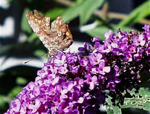 Foto af undersiden af vingerne på sommerfugle det hvide C. Fra sommerfuglebusken i haven på Nordfyn 2003.